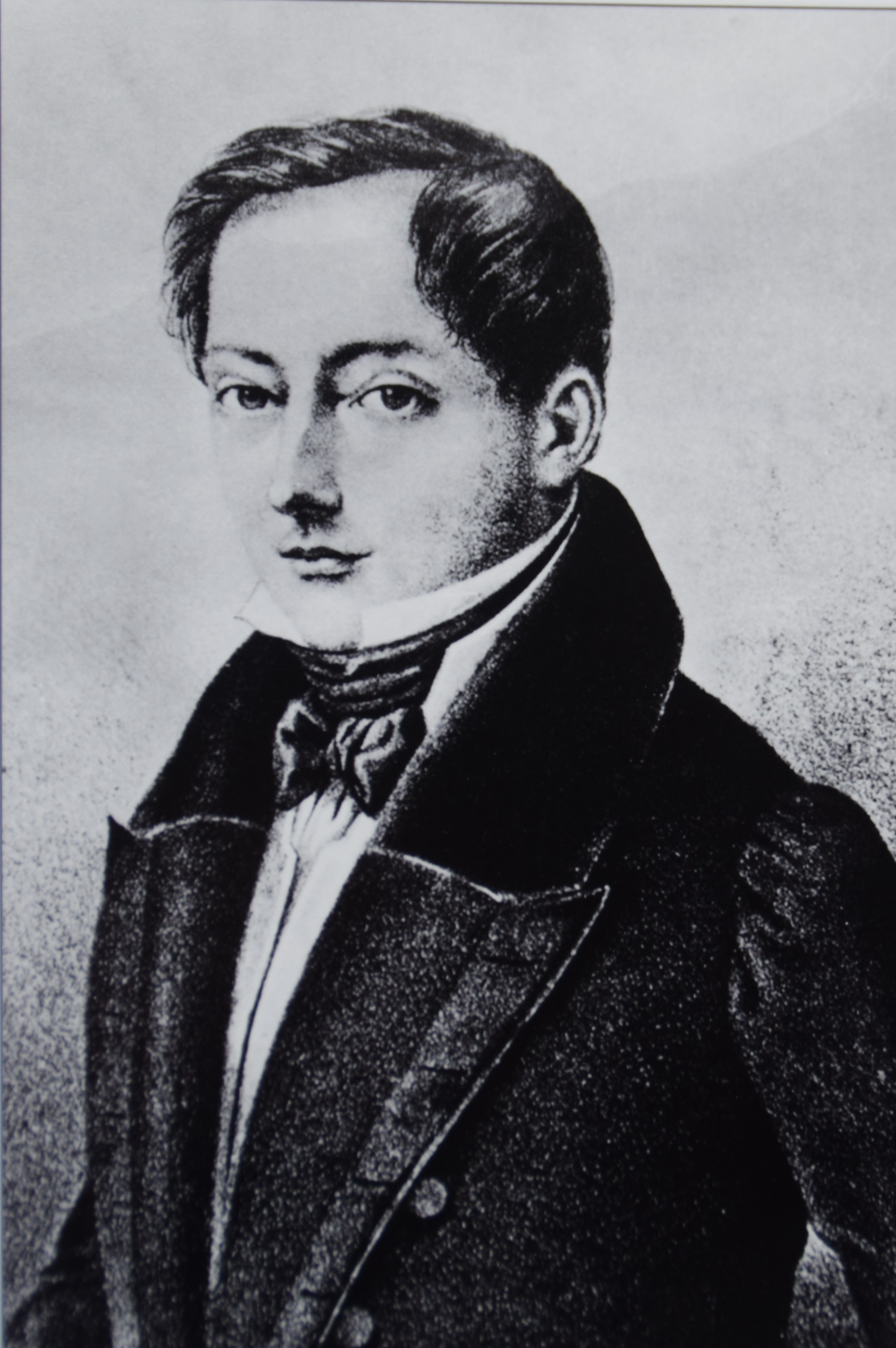 Bild von Julius Korn